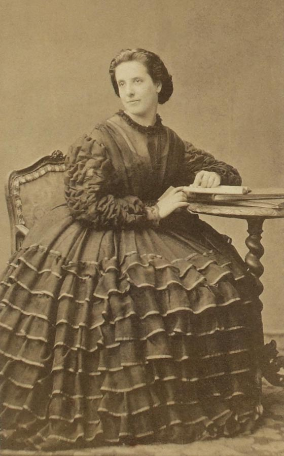 Caroline Barbot (1830-1893)